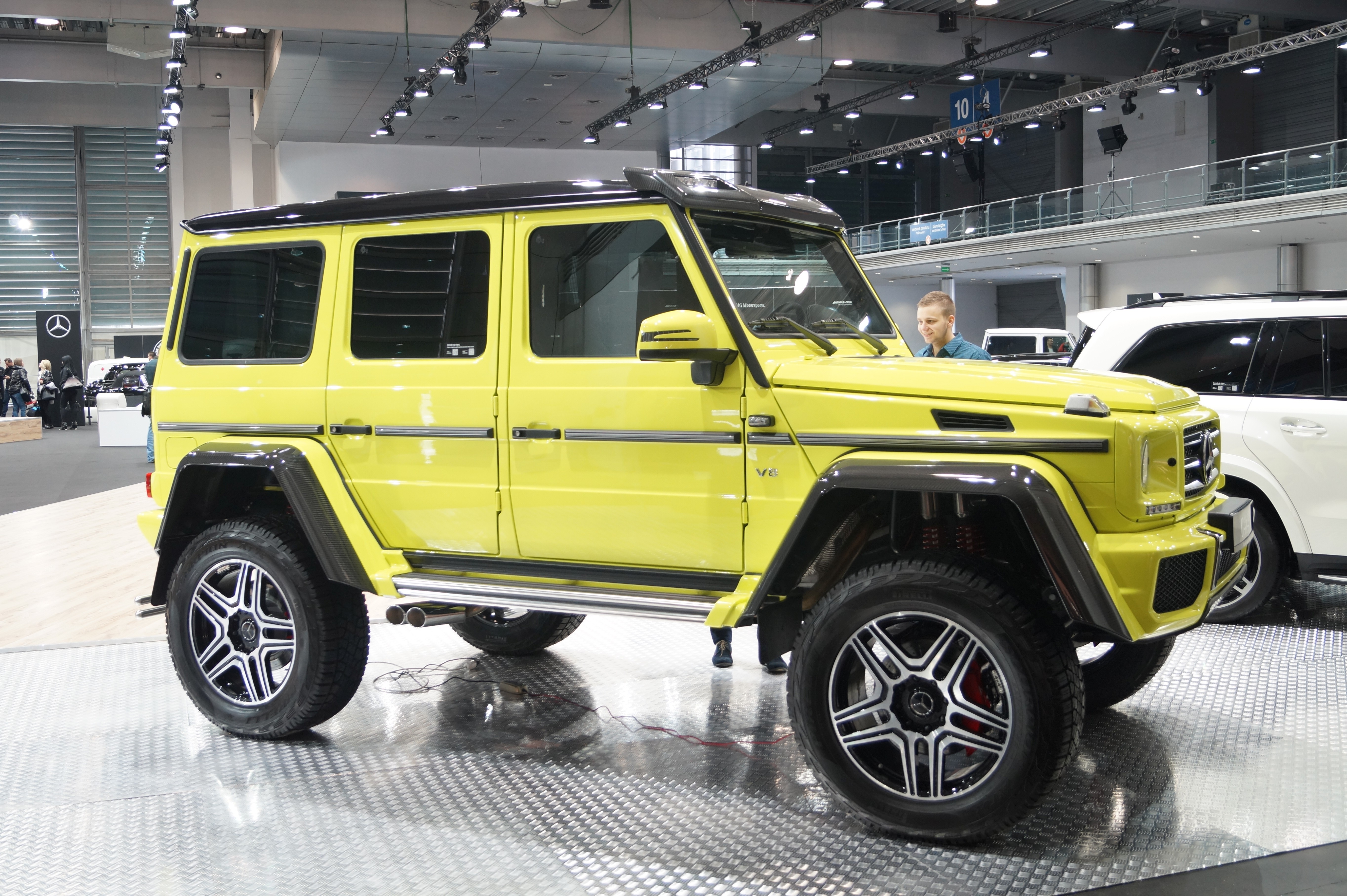 Prawy bok Mercedesa-Benz G 500 4x4^2 (W463) na Motor Show Poznań 2017.